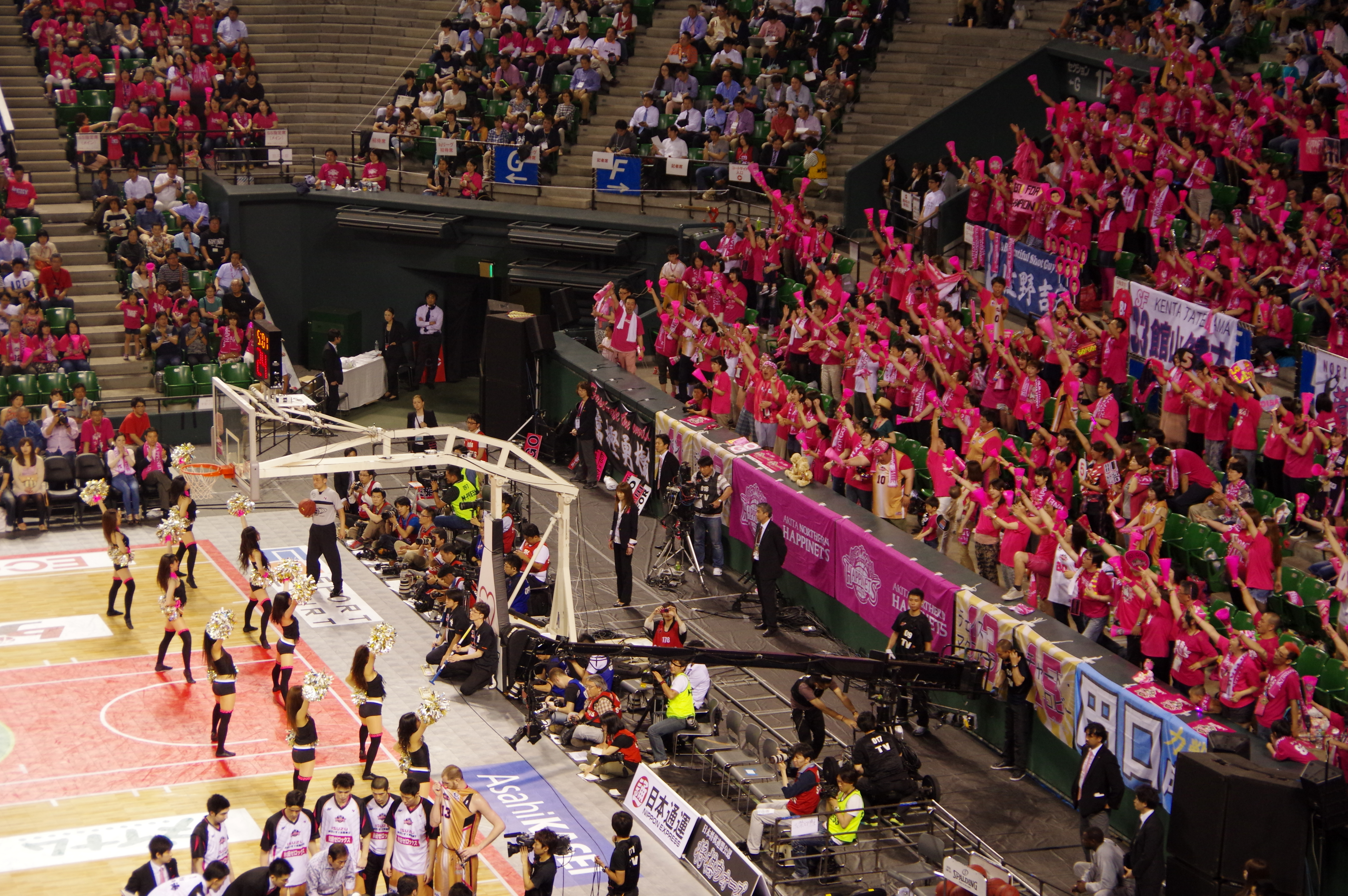 ｂｊリーグ 2013-2014シーズン プレイオフ ファイナルズ_027